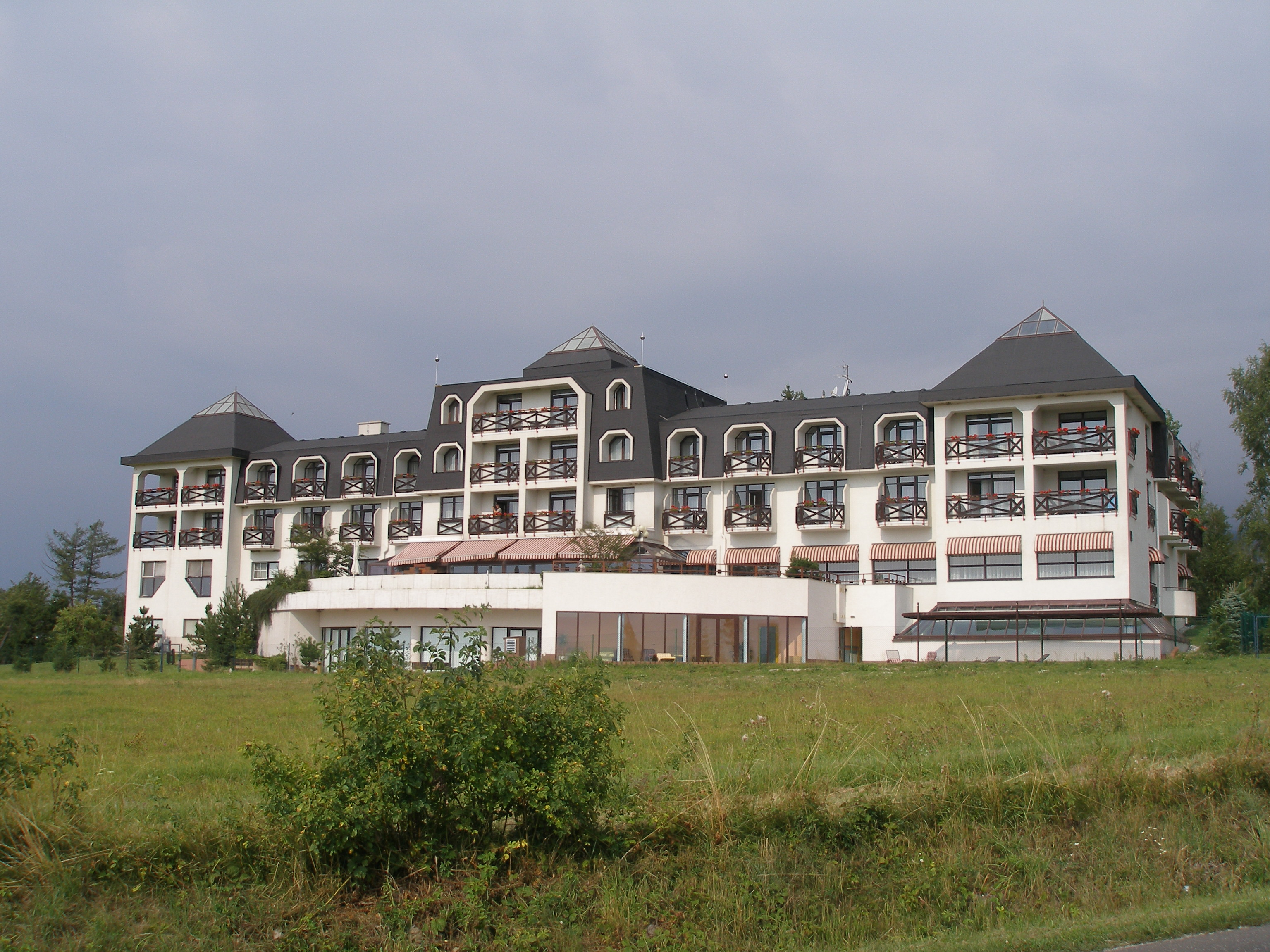 Okolie osady Gerlachov